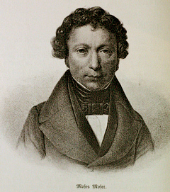 Moses Moser (1797-1838), jüdischer Bankier und Philantrop in Berlin